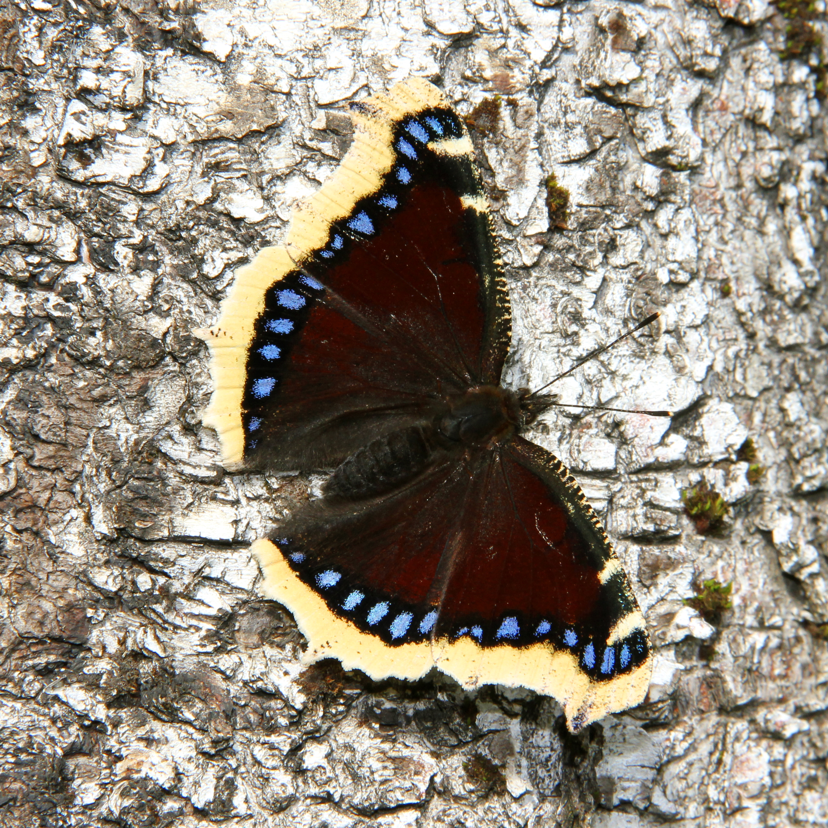 Nymphalis antiopa Траурница на стволе березы